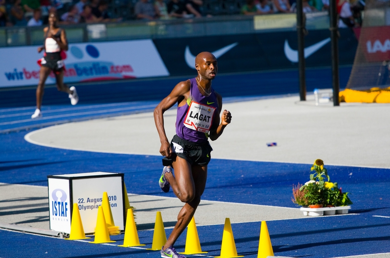 Bernard Lagat 3000m